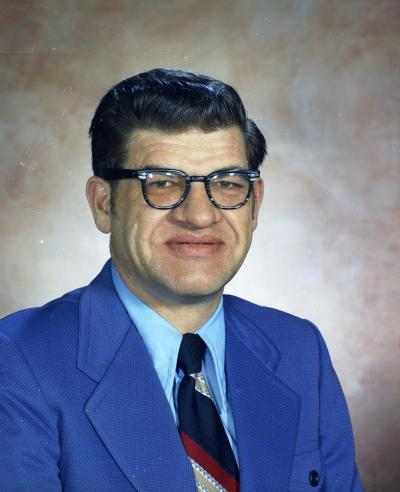 Senator R. H. Lewis, 1973